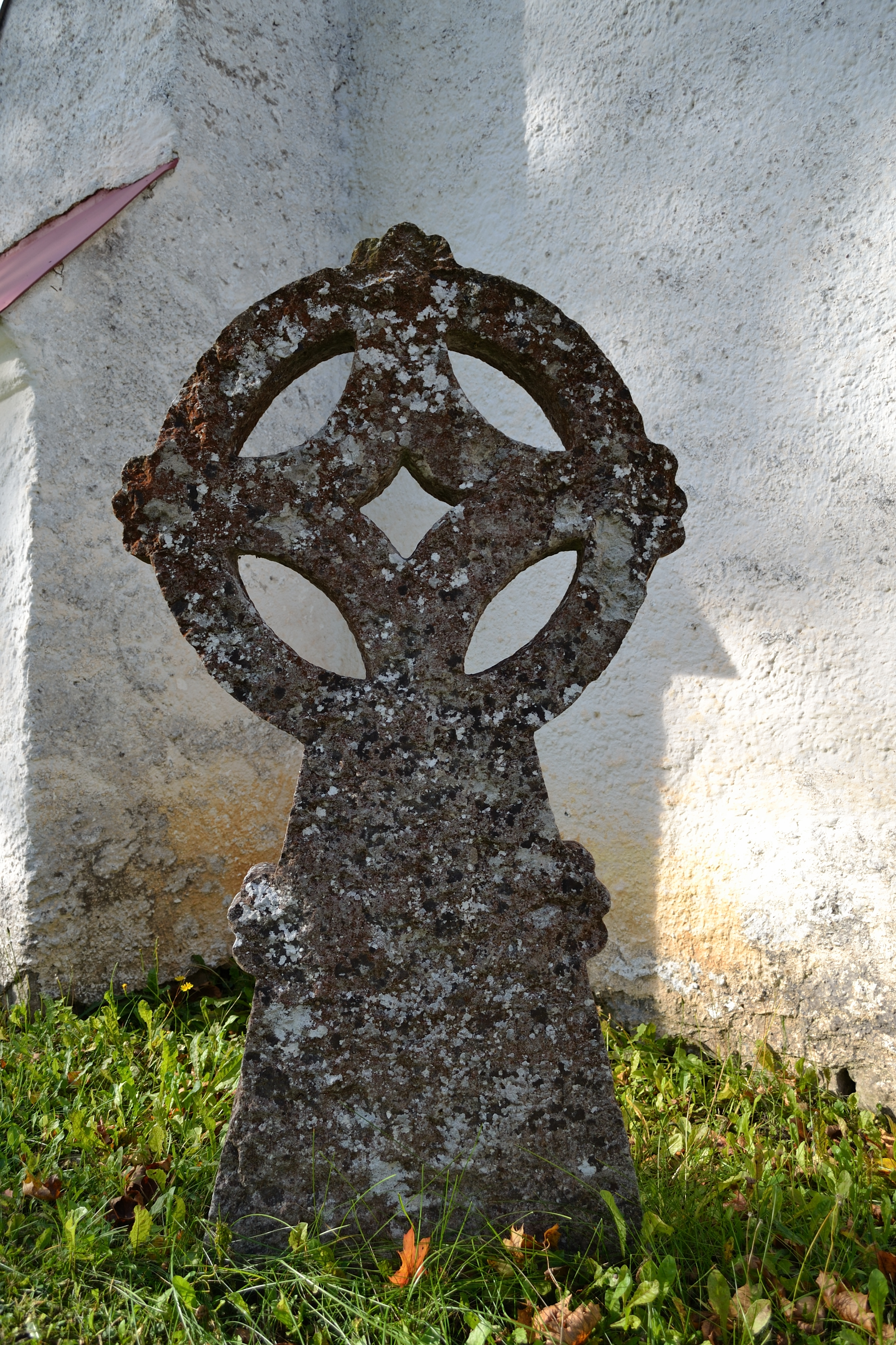 Ratasrist (registrinumber 5899 või 5901 või 5902), Juuru kirikuaed